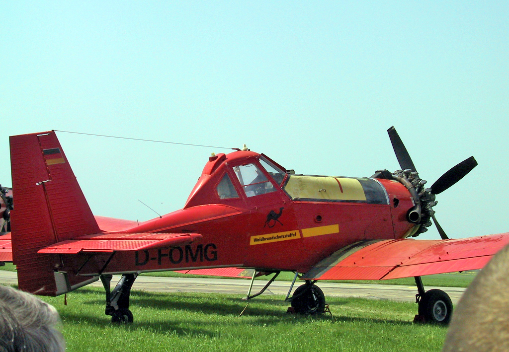 Eine PZL M-18 Dromader der Waldbrandschutzstaffel auf der ILA 2002.